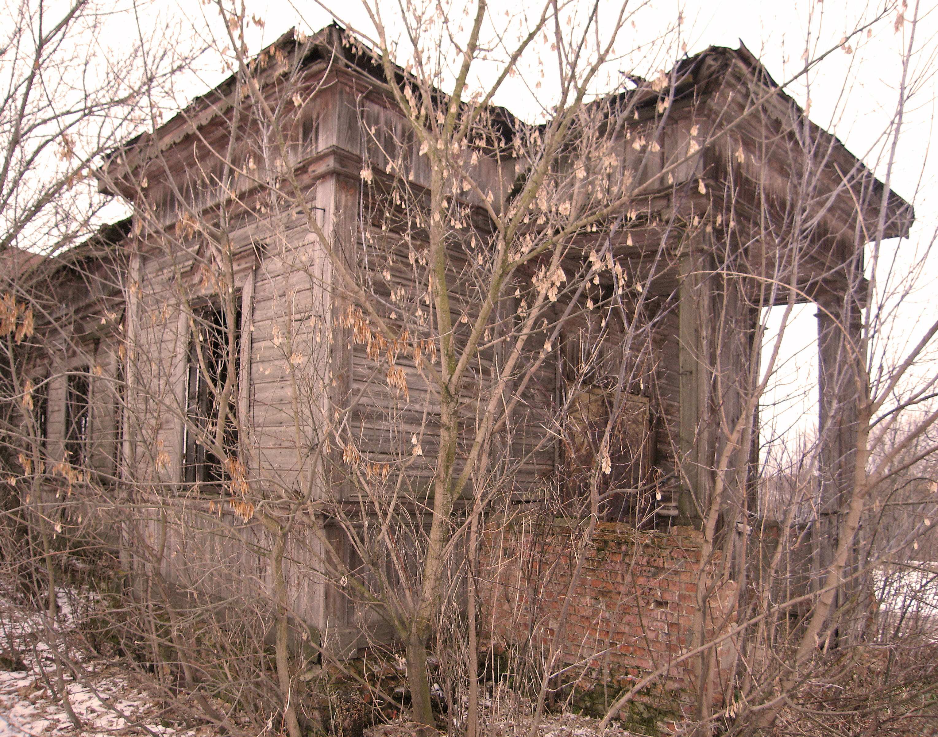 Церква Димитрія Солунського 1910р., с.Катеринівка, Великобурлуцький р-н.,Харківська обл.